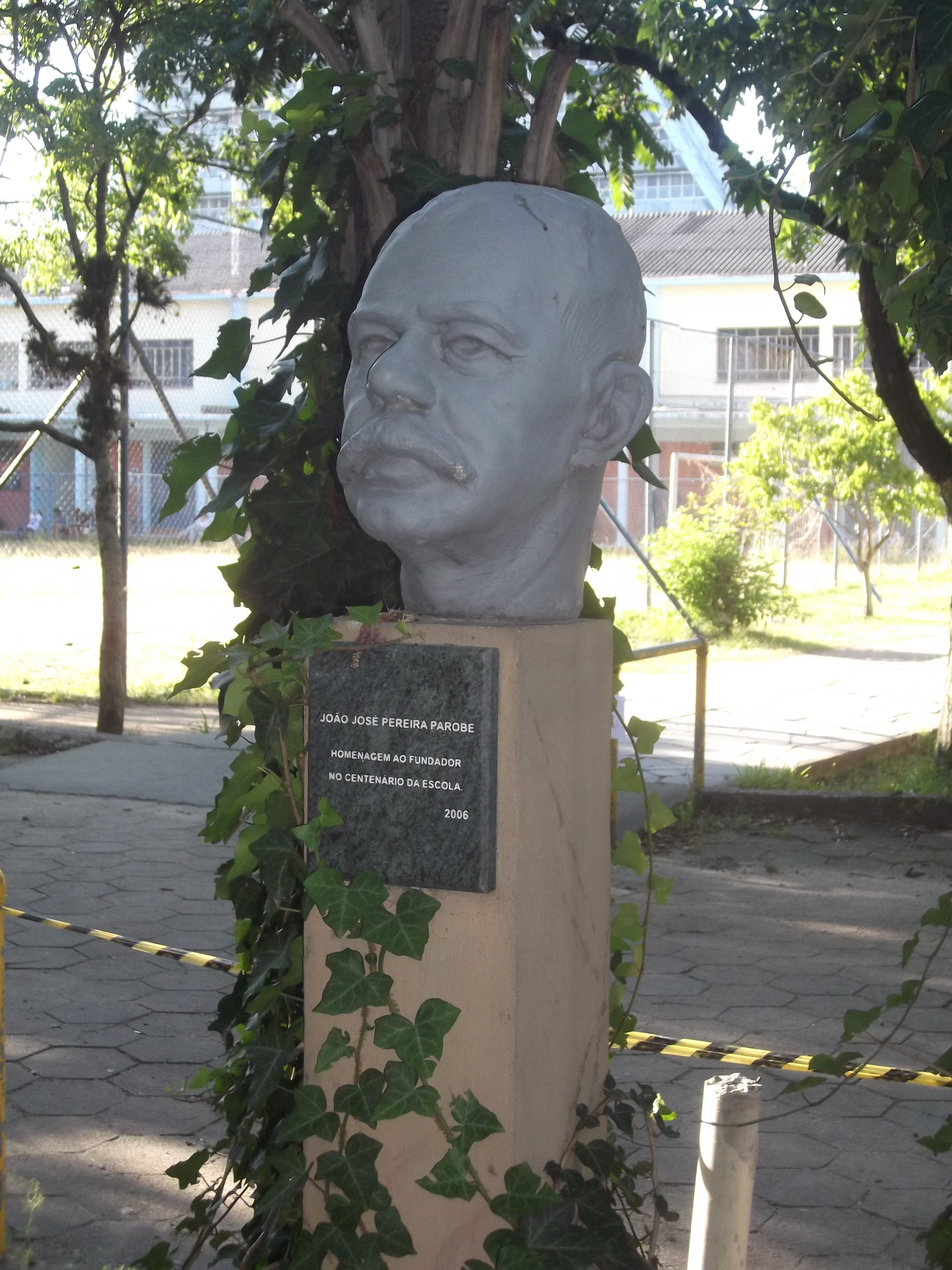 Busto de João José Pereira Parobé na Escola Técnica Parobé (Porto Alegre, Brasil)